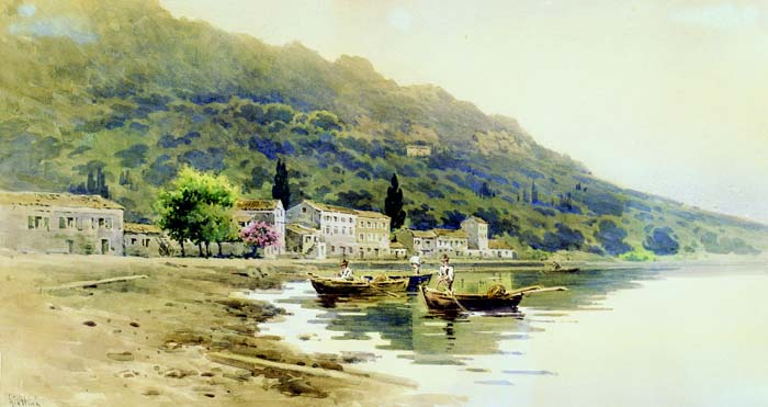 Μπενίτσες, Κέρκυρα υδατογραφία σε χαρτί 40x76 εκ.